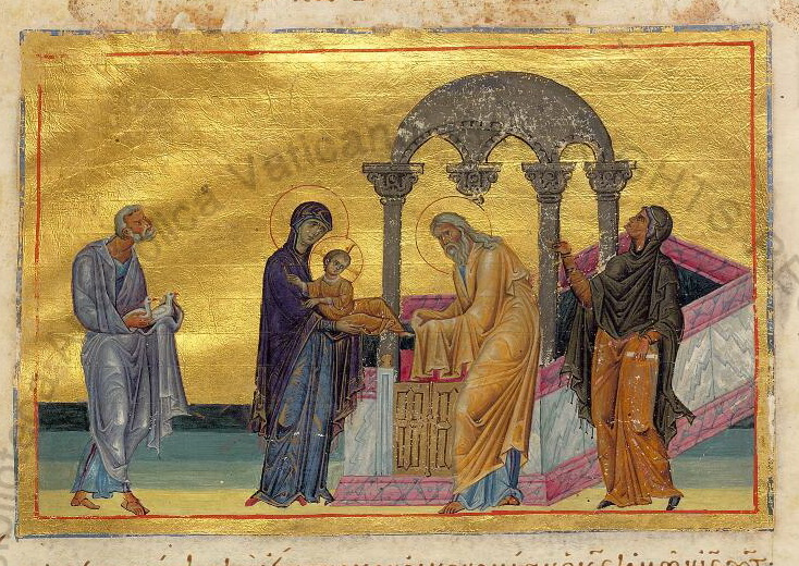 Menologium des Kaisers Basileios II